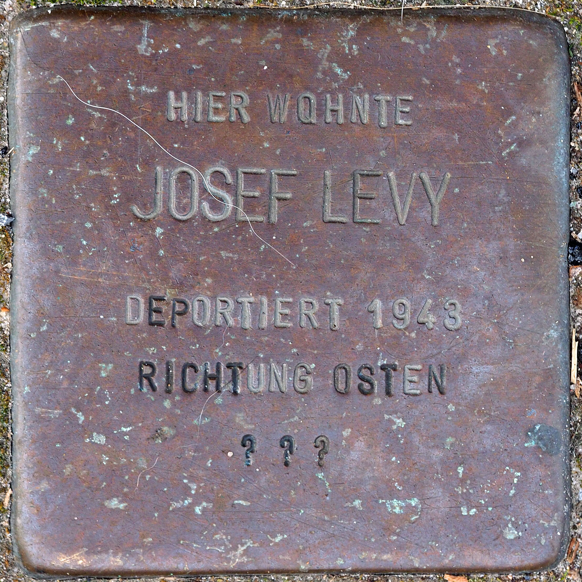 Stolpersteine MG: Levy, Josef